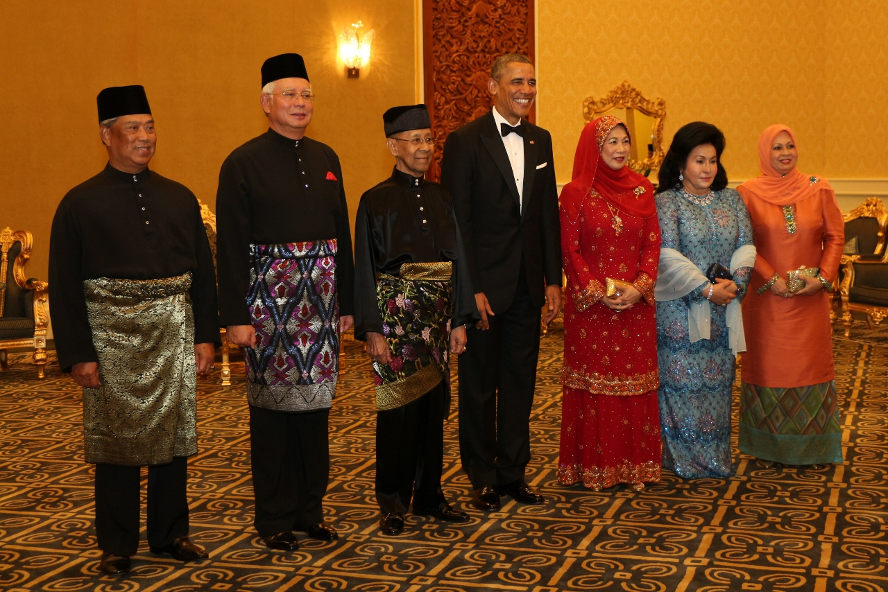 Tan Sri Muhyiddin Yassin dan isteri, Puan Sri Noorainee Abdul Rahman